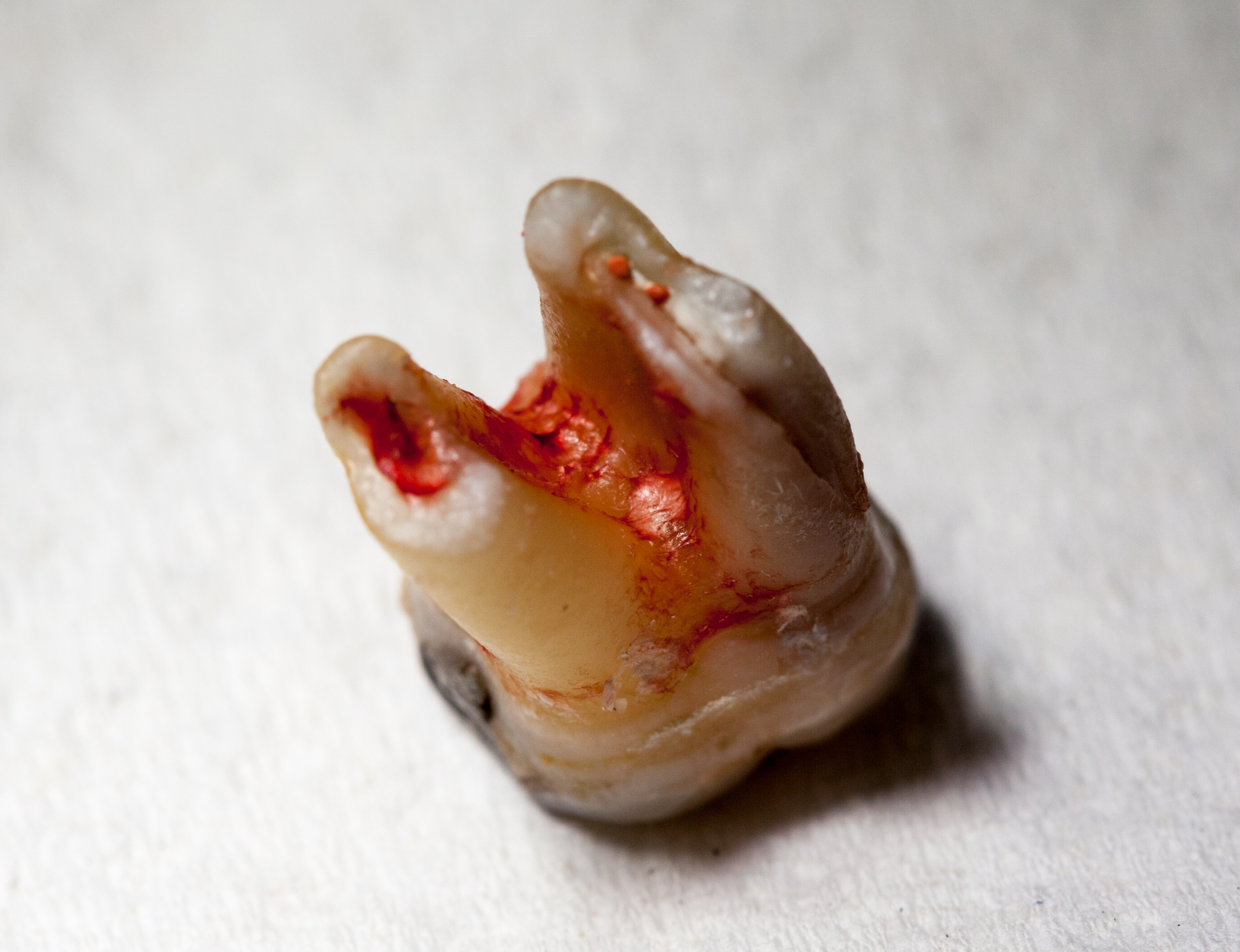 extrahierter zahn; Zustand nach Wurzelkappung; WSR